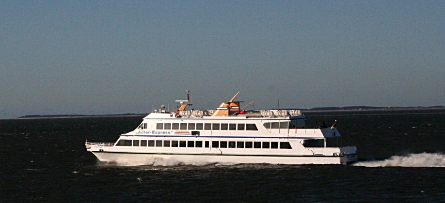 Adler-Express Schnellfähre vor Langeneß